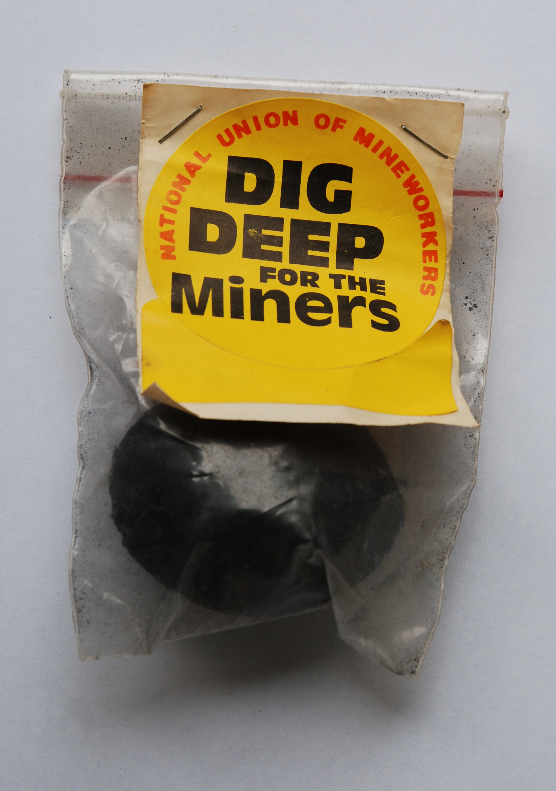 Solidaritätspäckchen der National Union of Miners aus Anlass der Streiks 1984/1985